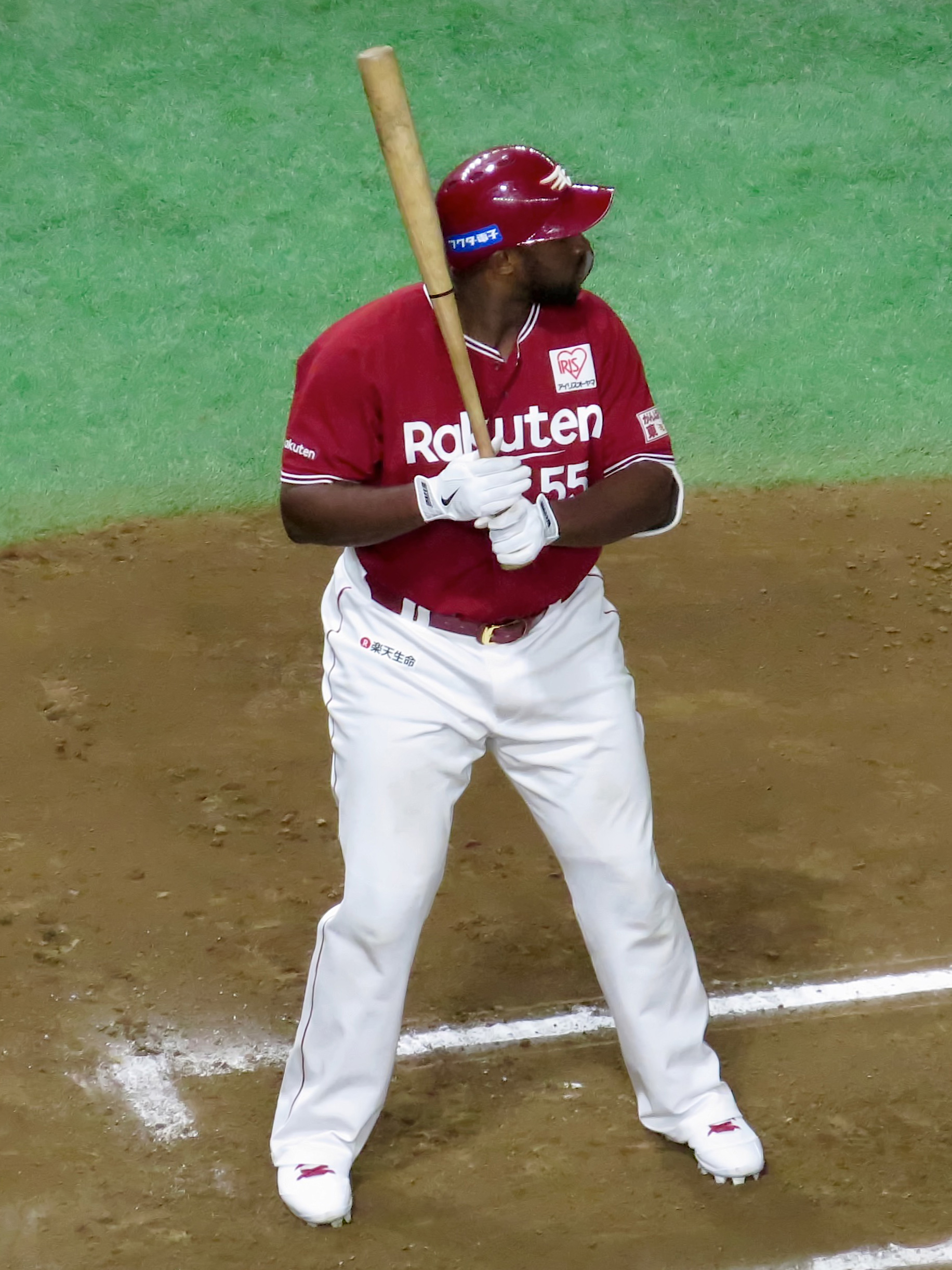 東北楽天ゴールデンイーグルスの選手。東京ドームにて。